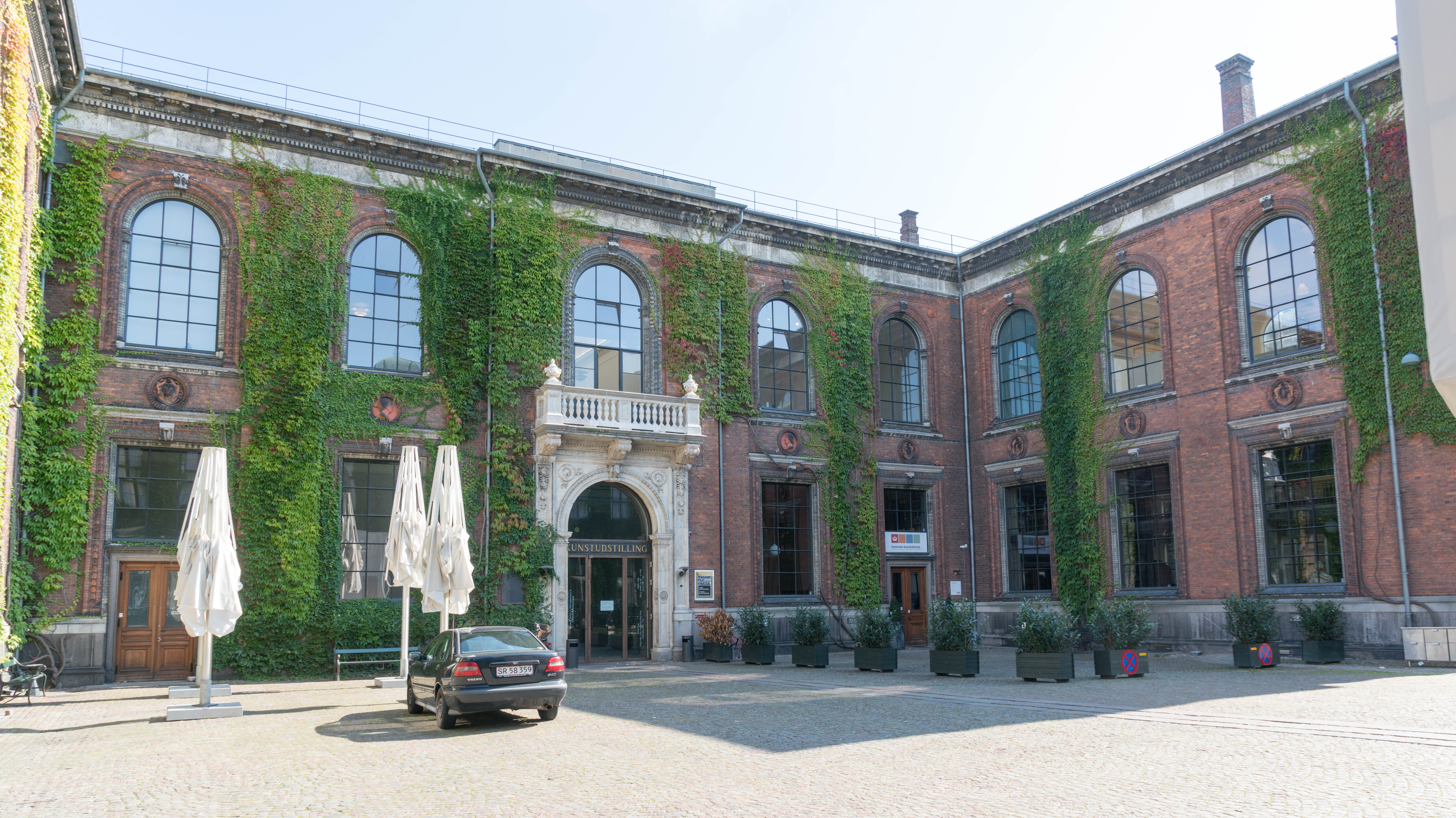 Kunsthal Charlottenborg in Copenhagen, Denmark